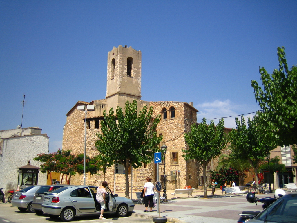 Foto hecha por en horizontal desde la plza de la iglesia de Cunit hacia el sur, el sábado 13 de agosto del 2005 a las 11:55 de la mañana. Hecha con una cámara CANON ixus 40